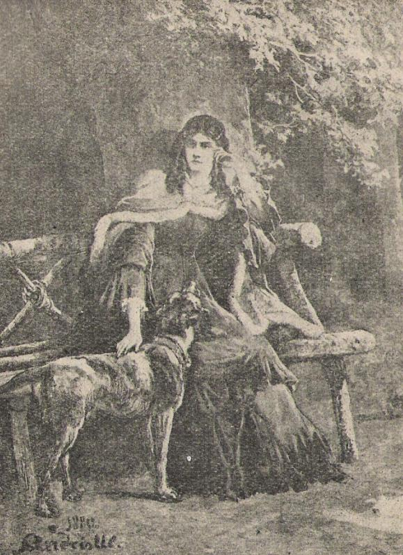 Obraz Andriollego do powieści Józefa Korzeniowskiego, "Kollokacja".